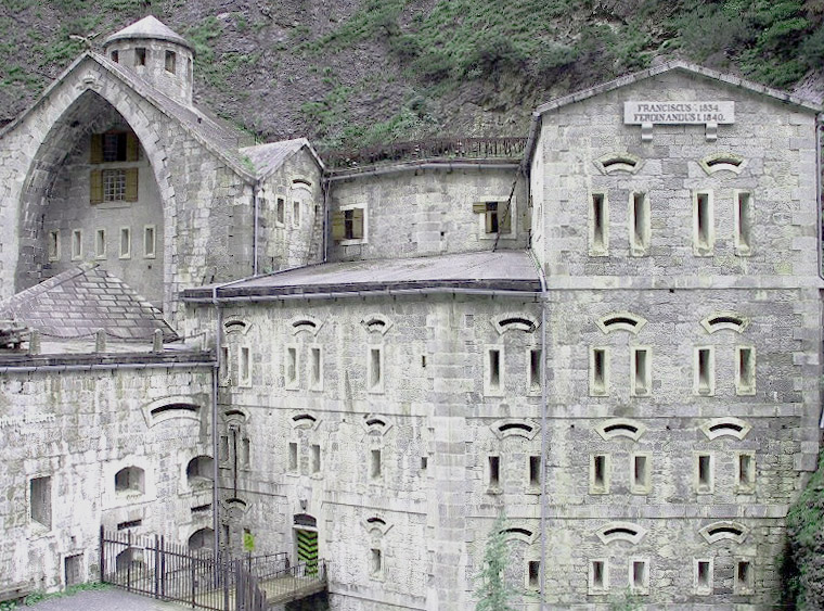 Straßensperre Nauders von Norden (von Landeck), Tirol, Austria.